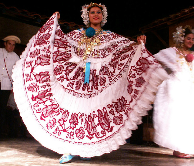 Bailes y trajes tradicionales panameños en el Restaurant Las Tinajas